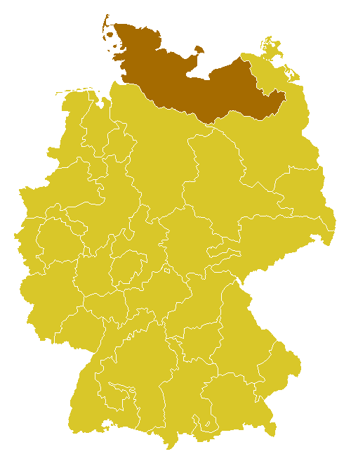 Beschreibung: Katholische Erz-Diözese/Bistum Hamburg in Deutschland